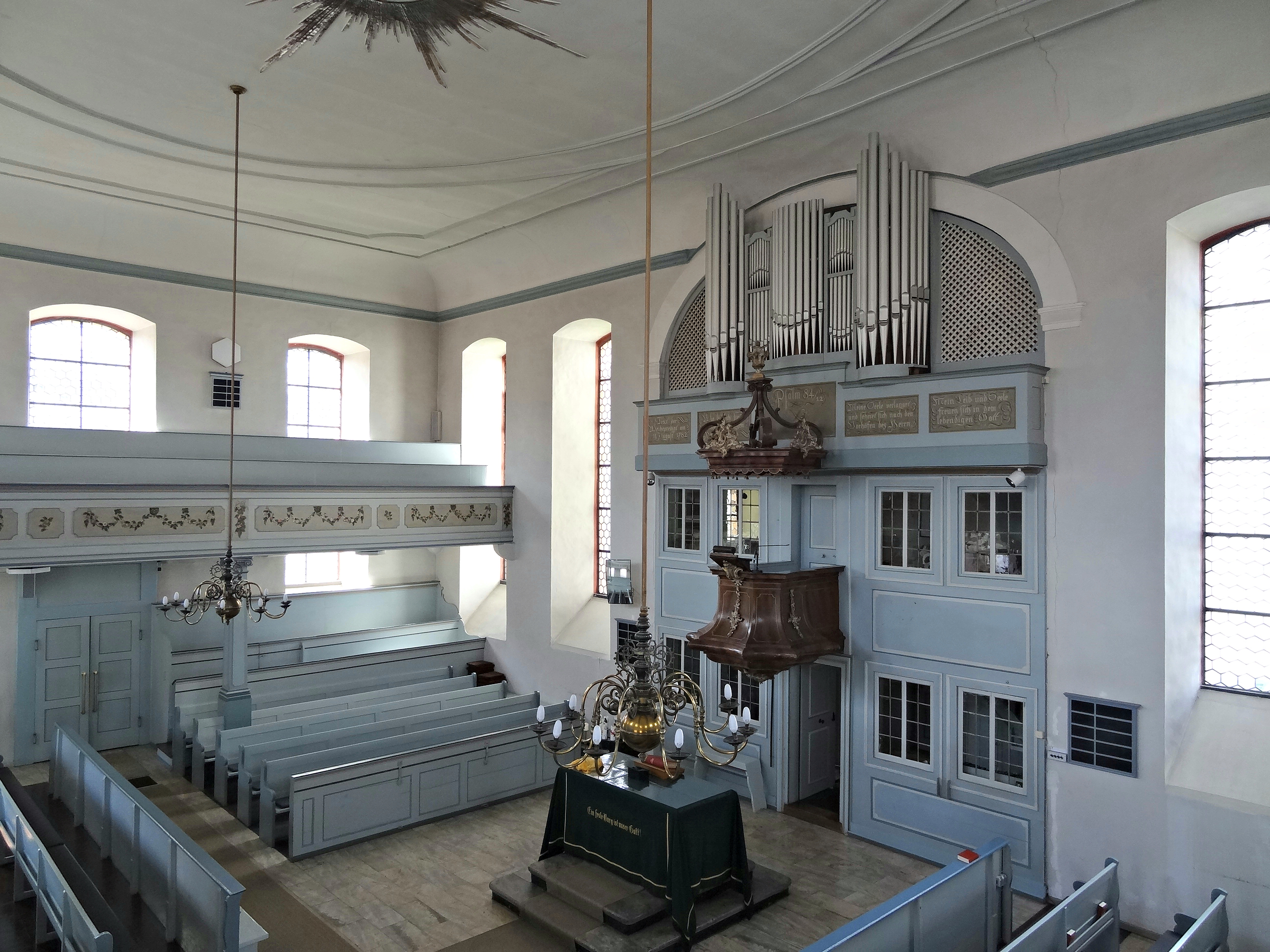 Evangelische Kirche Langsdorf (Lich)